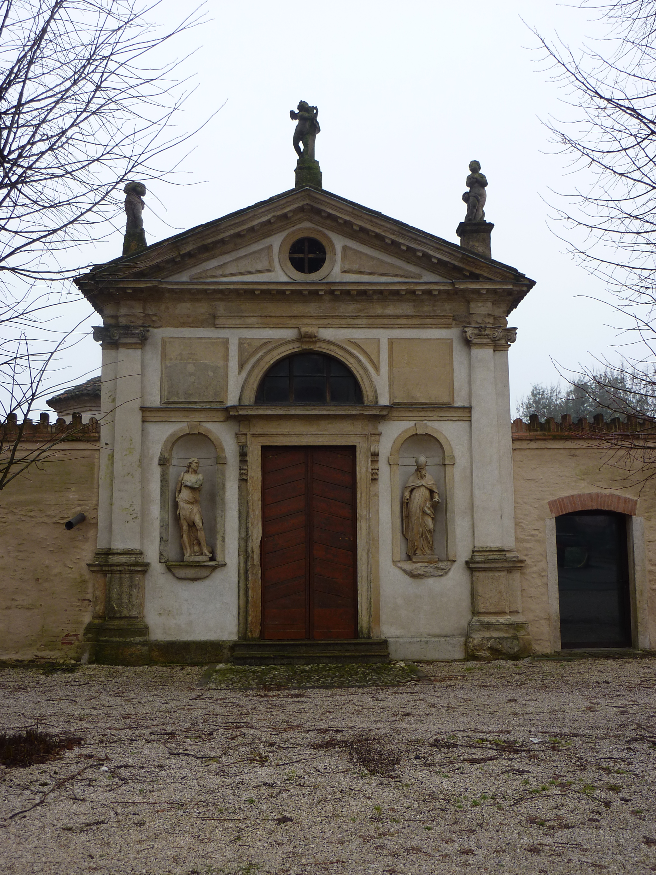 Oratorio del Settecento dedicato al Santissimo Redentore, appartenente alla frazione di Ponte di Barbarano